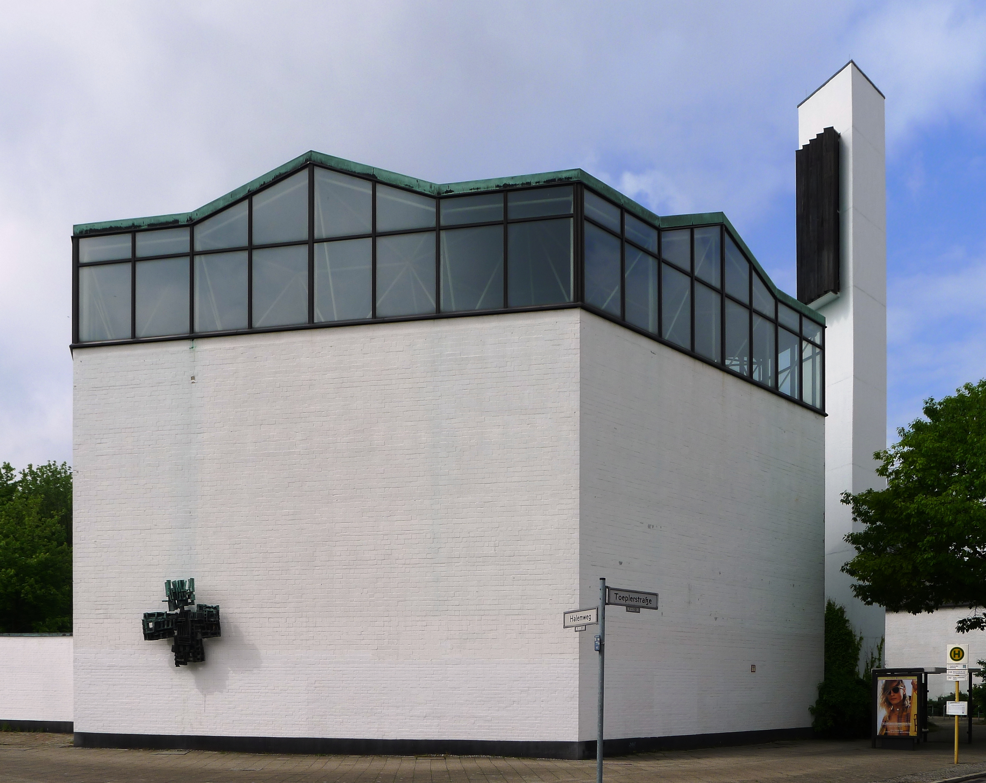 evangelische Sühne-Christi-Kirche in Berlin-Charlottenburg-Nord, Halemweg 25; erbaut 1962-1964 nach Entwurf von Hans-Rudolf Plarre; unter Denkmalschutz